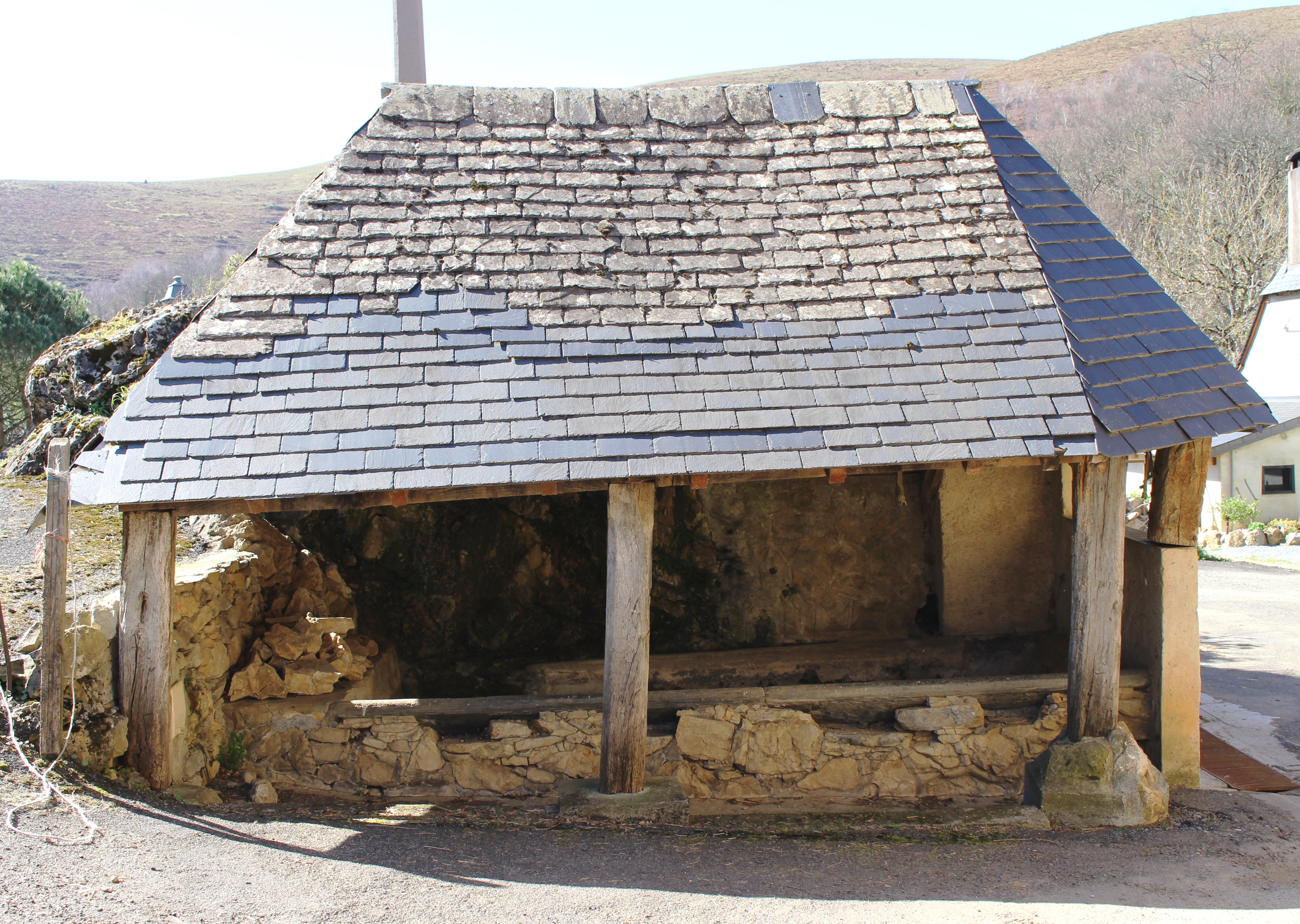 Lavoir de Sère-Lanso (Hautes-Pyrénées)